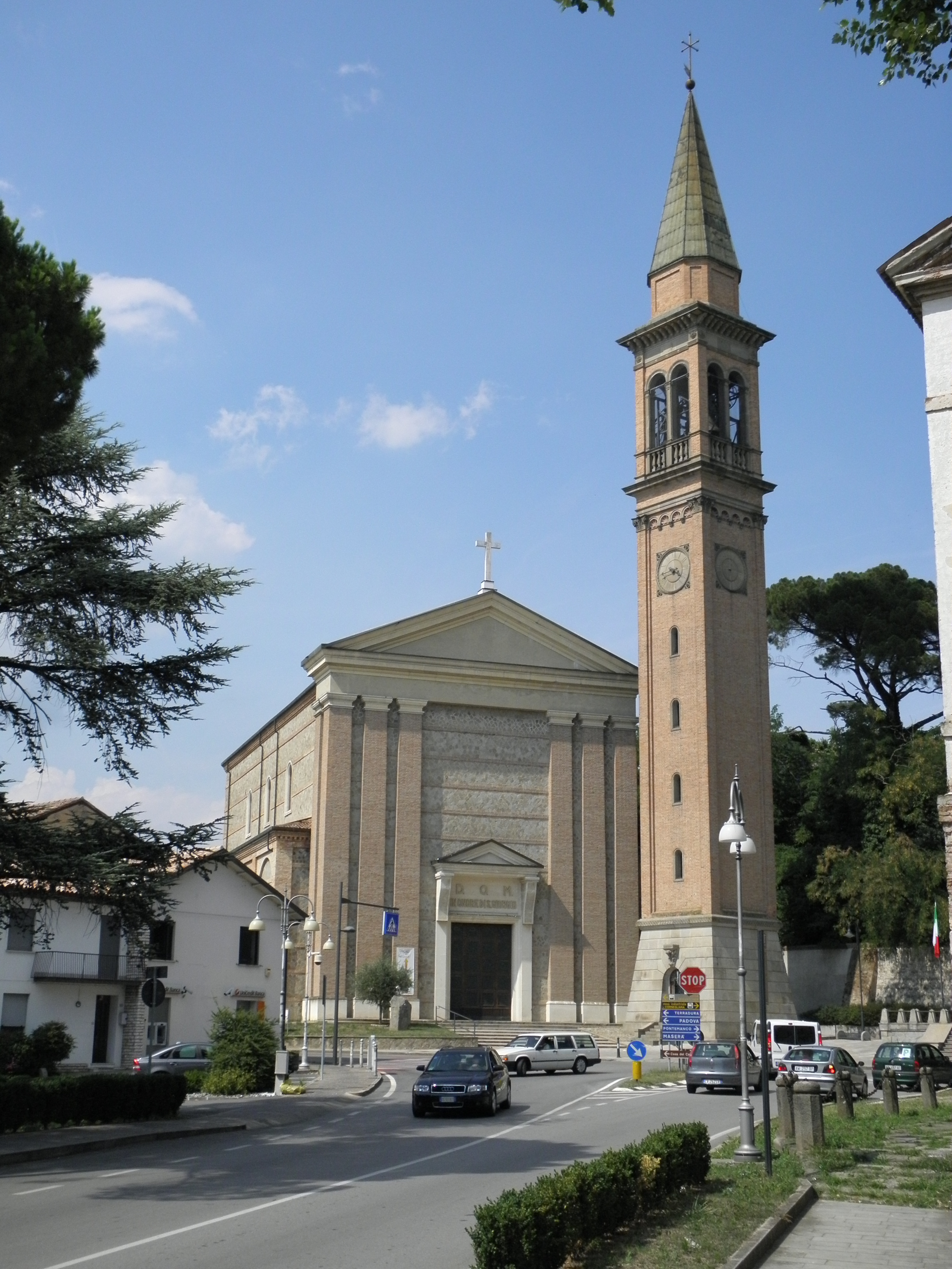 Carrara San Giorgio, sede municipale del comune di Due Carrare: la chiesa parrocchiale di San Giorgio edificata nei primi del XX secolo con i materiali provenienti dalle strutture del campo di volo di San Pelagio.